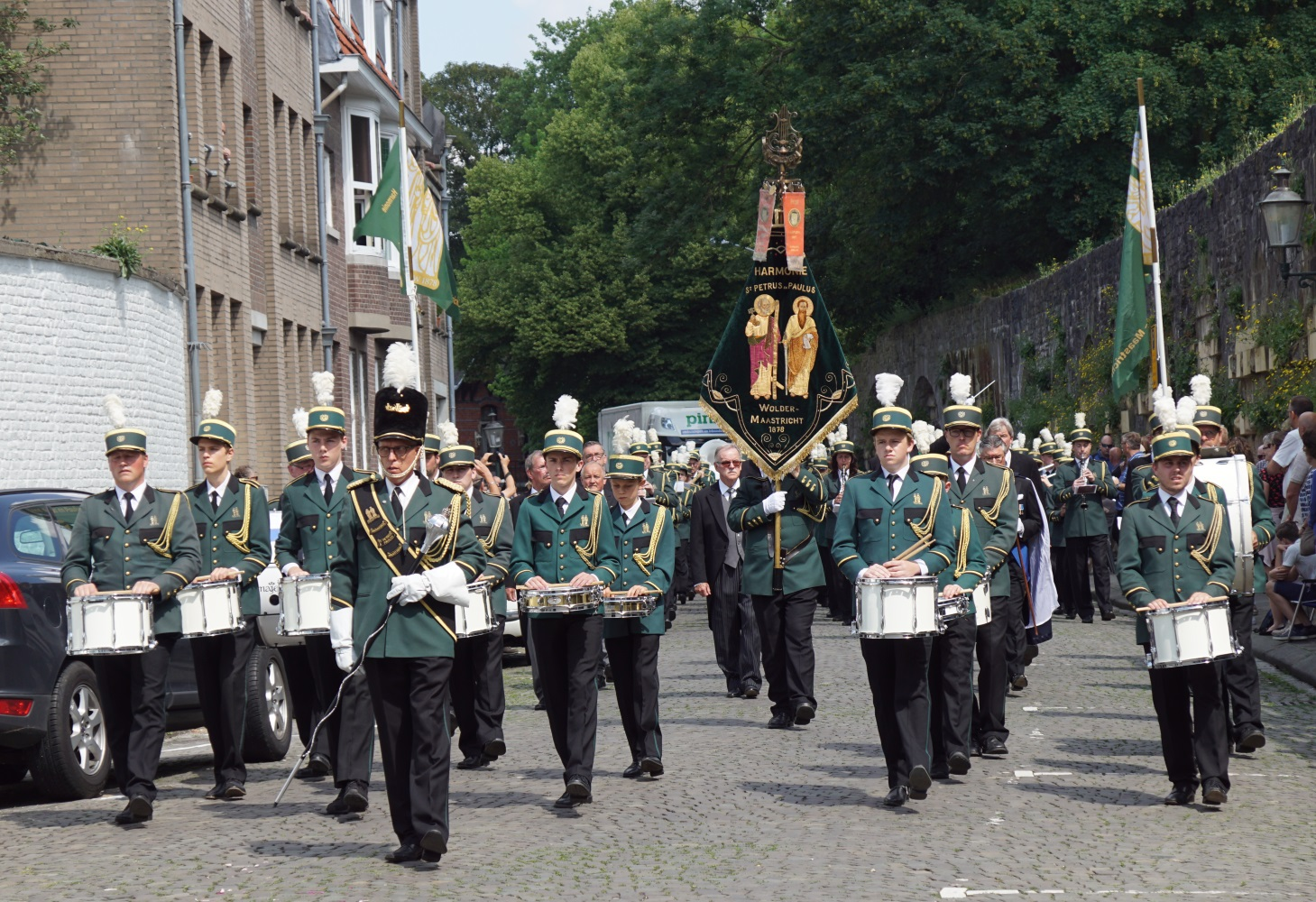 Heiligdomsvaart Maastricht, 2e Ommegang. Harmonie Sint Petrus en Paulus, Wolder-Maastricht.